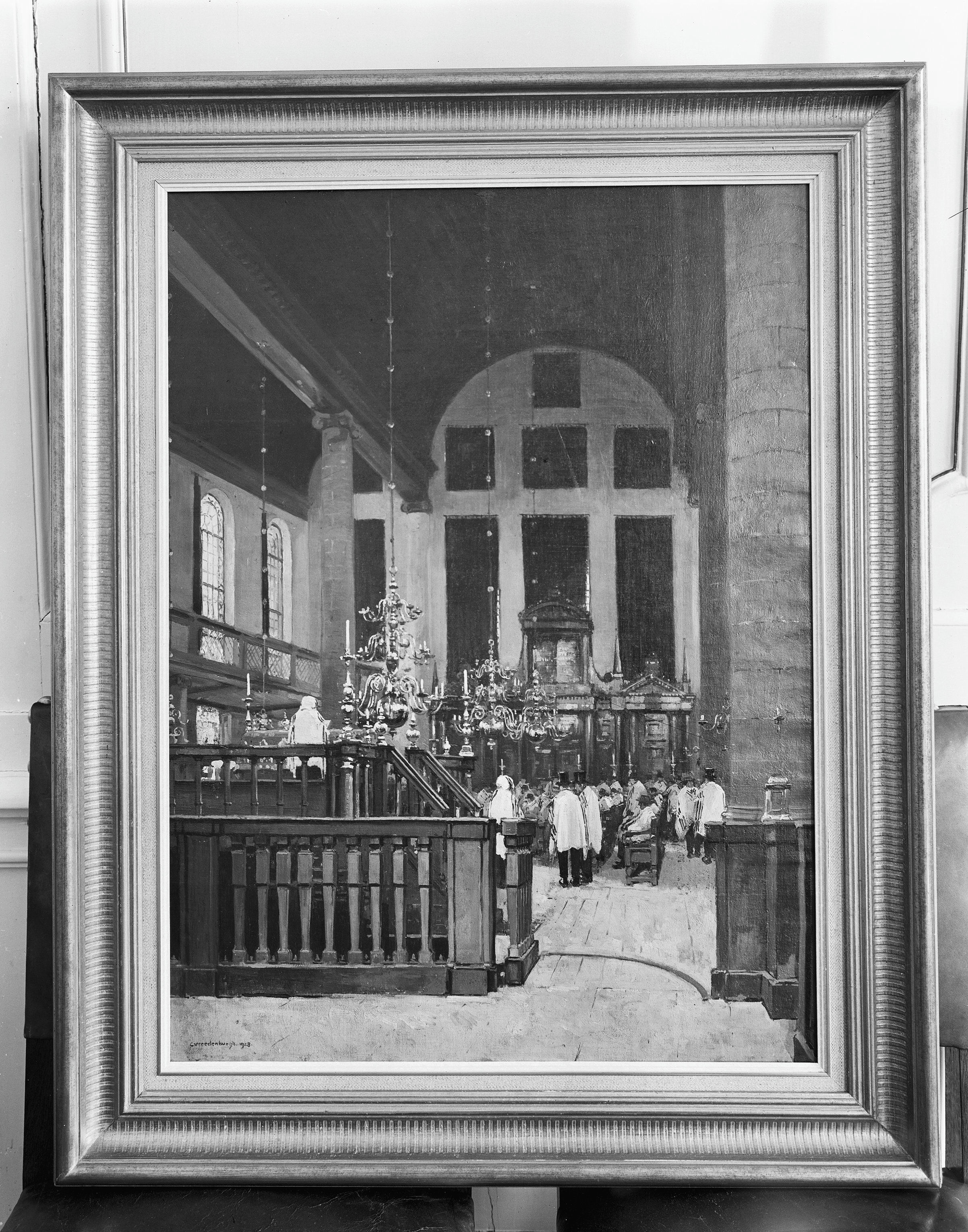 1ste Portugese Esnoga (Synagoge): schilderij van G.Vredenburg 1923